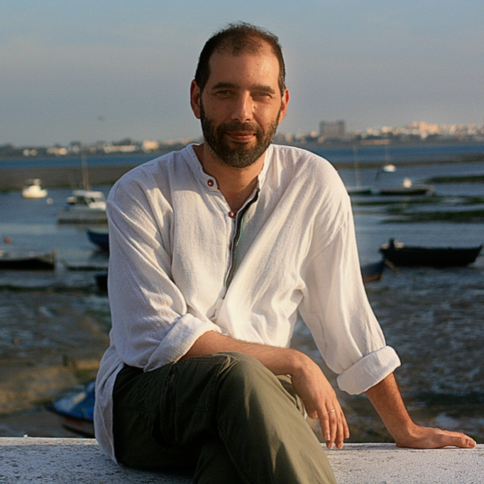 Antonio Javier Romero Alfaro